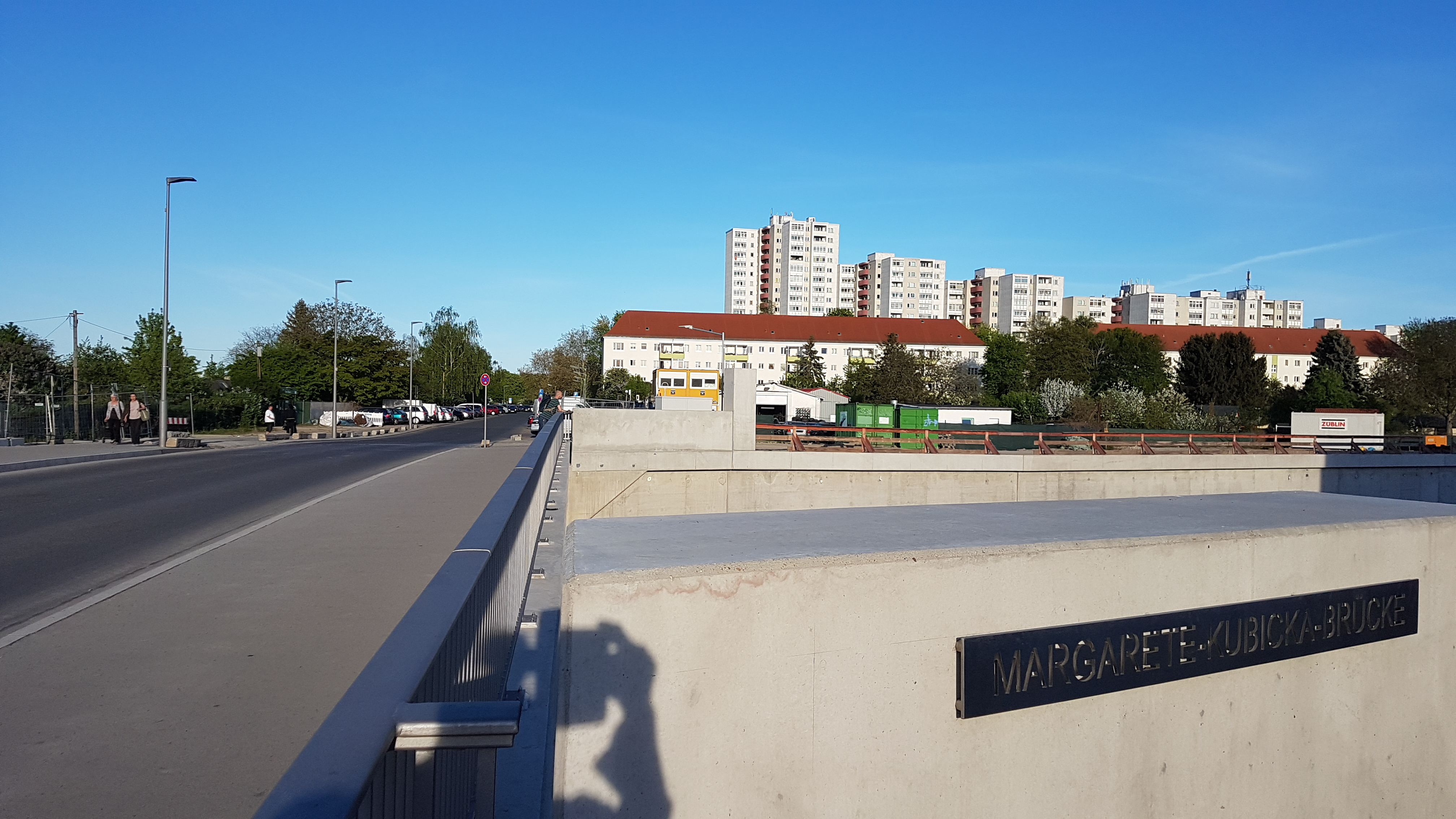 Blick über die Margarete-Kubicka-Brücke in Berlin-Neuköln in Richtung Osten. Die Brücke wurde im Zuge des Baus des 17. Bauabschnitt der BAB 100 errichtet und führt die Dieselstraße über die Autobahn. Im Hintergrund rechts liegt die sogenannte Weiße Siedlung an der Aronsstraße.